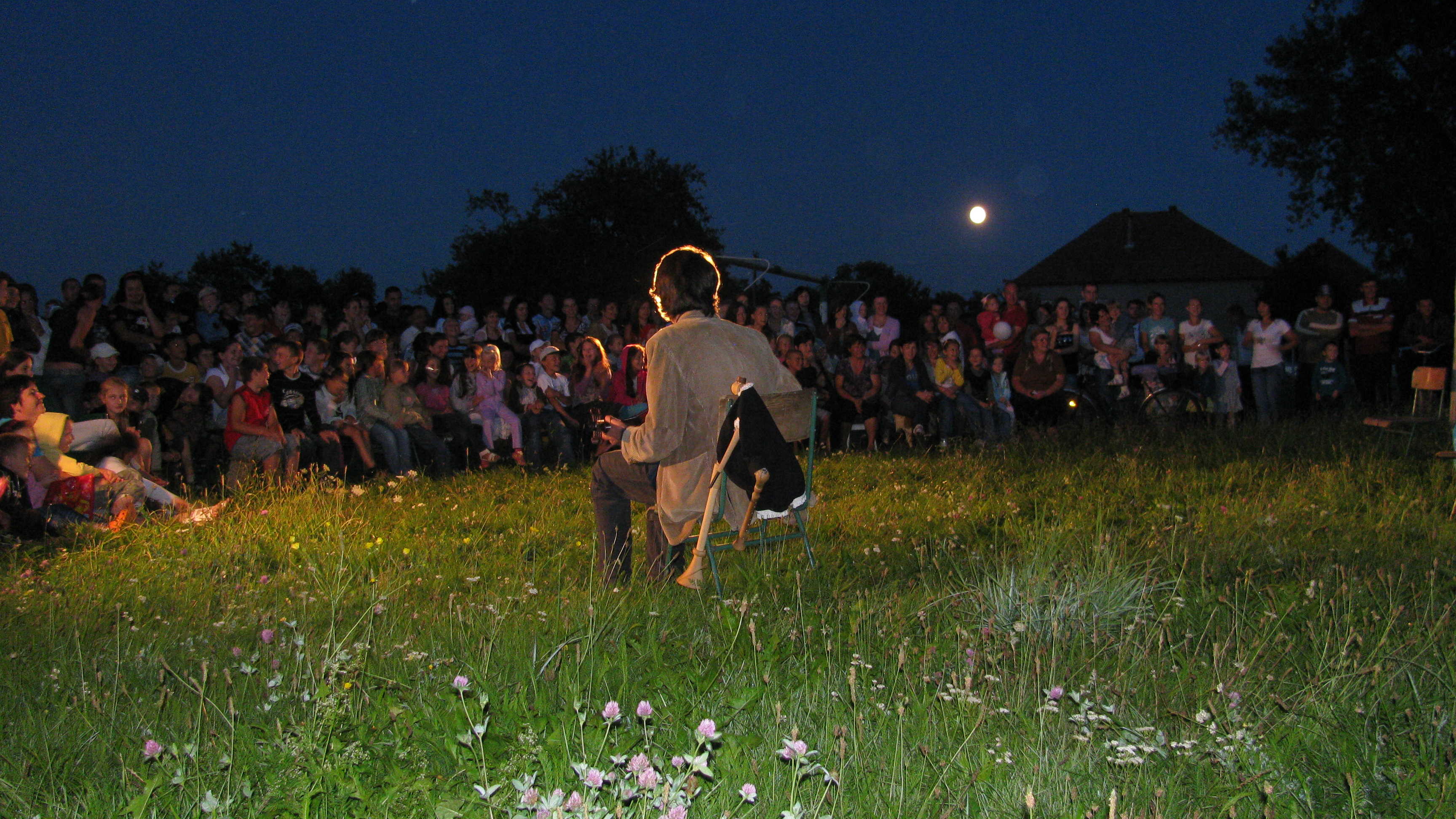 Vándorszínész az éjben